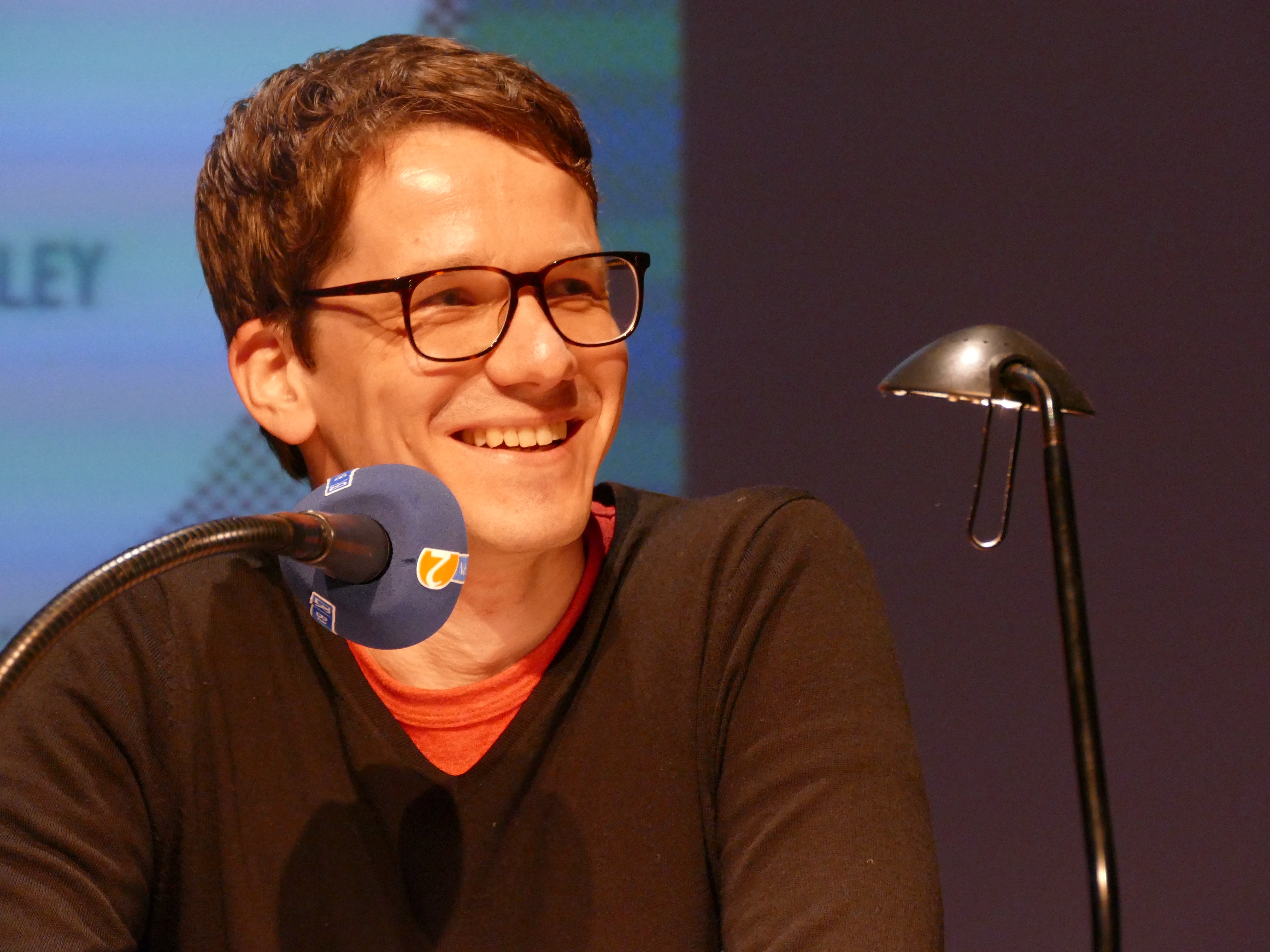 Fridolin Schley liest bei den Wortspielen 2016 in München aus seiner Erzählung "Die Ungesichter".